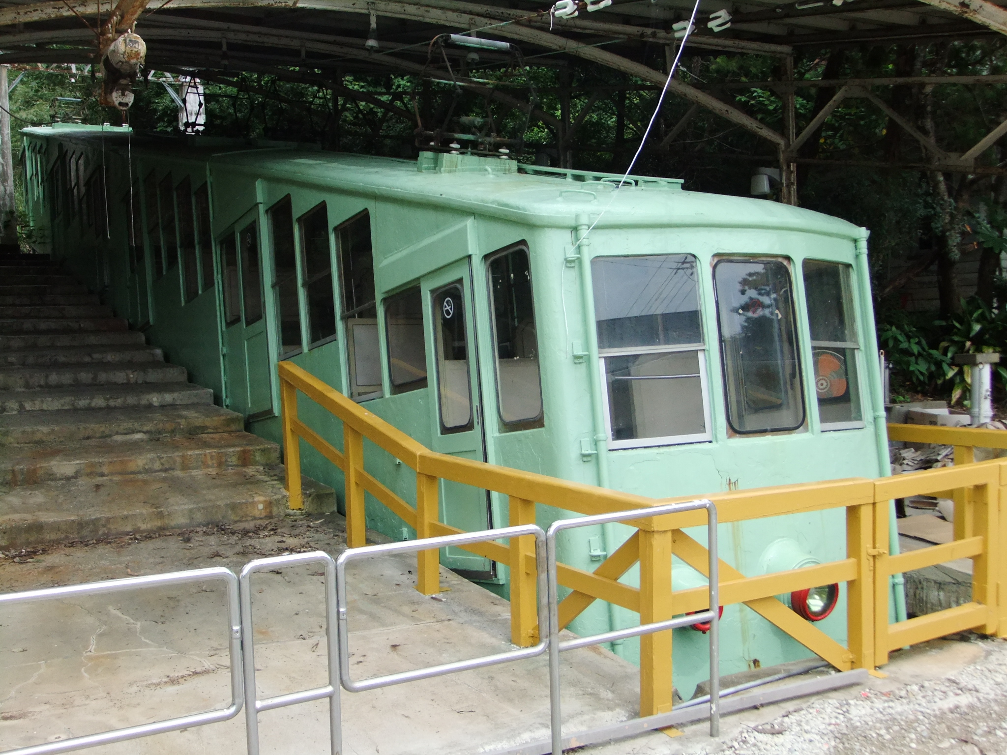 廃止後保管されている屋島ケーブルの搬器 屋島登山口駅跡